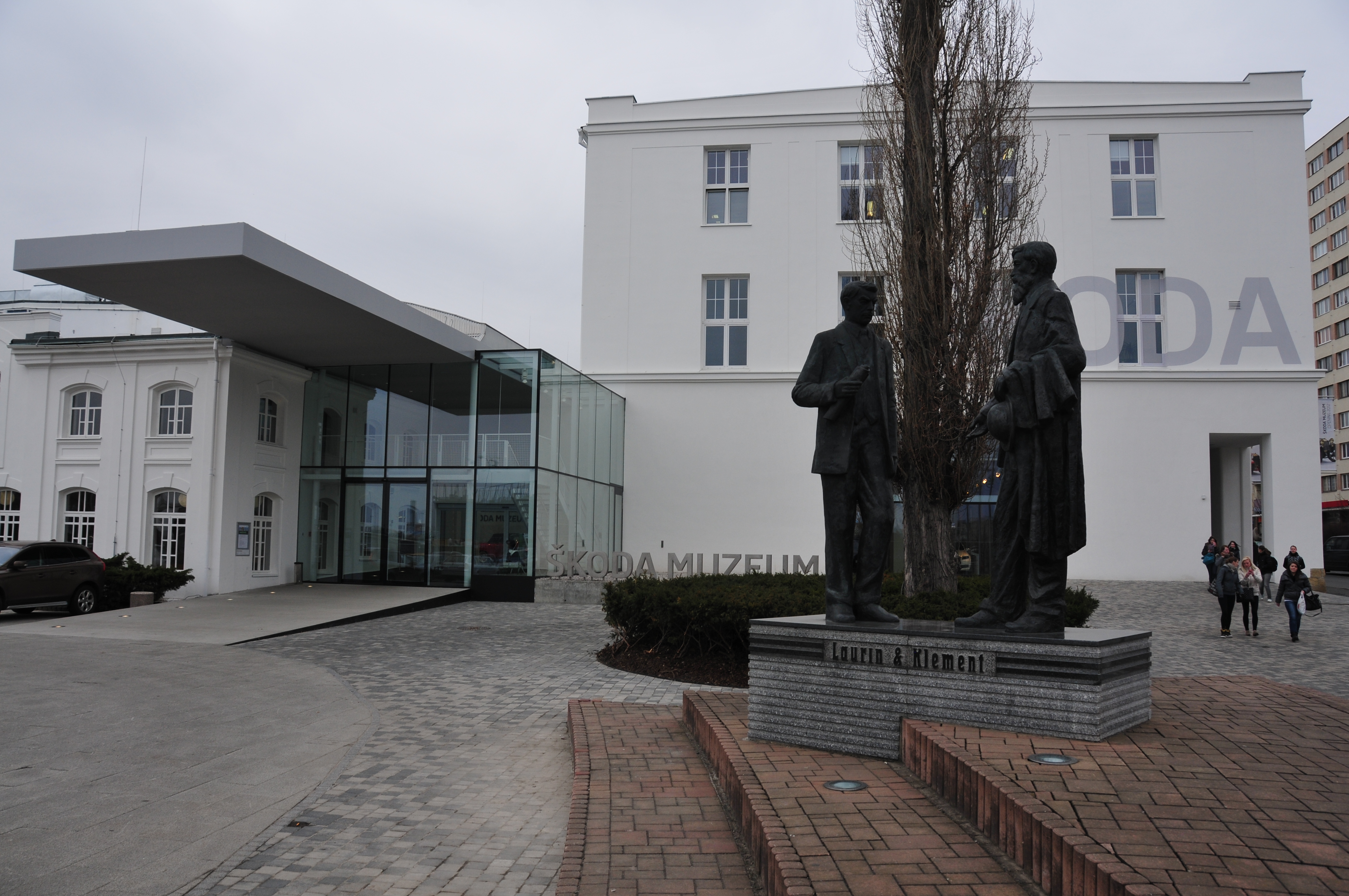 Fototermin Škoda Museum Mladá Boleslav 2013 Fototermin Škoda Muzeum 5. April 2013 in Mladá Boleslav This work is free and may be used by anyone for any purpose. If you wish to use this content, you do not need to request permission as long as you follow any licensing requirements mentioned on this page.